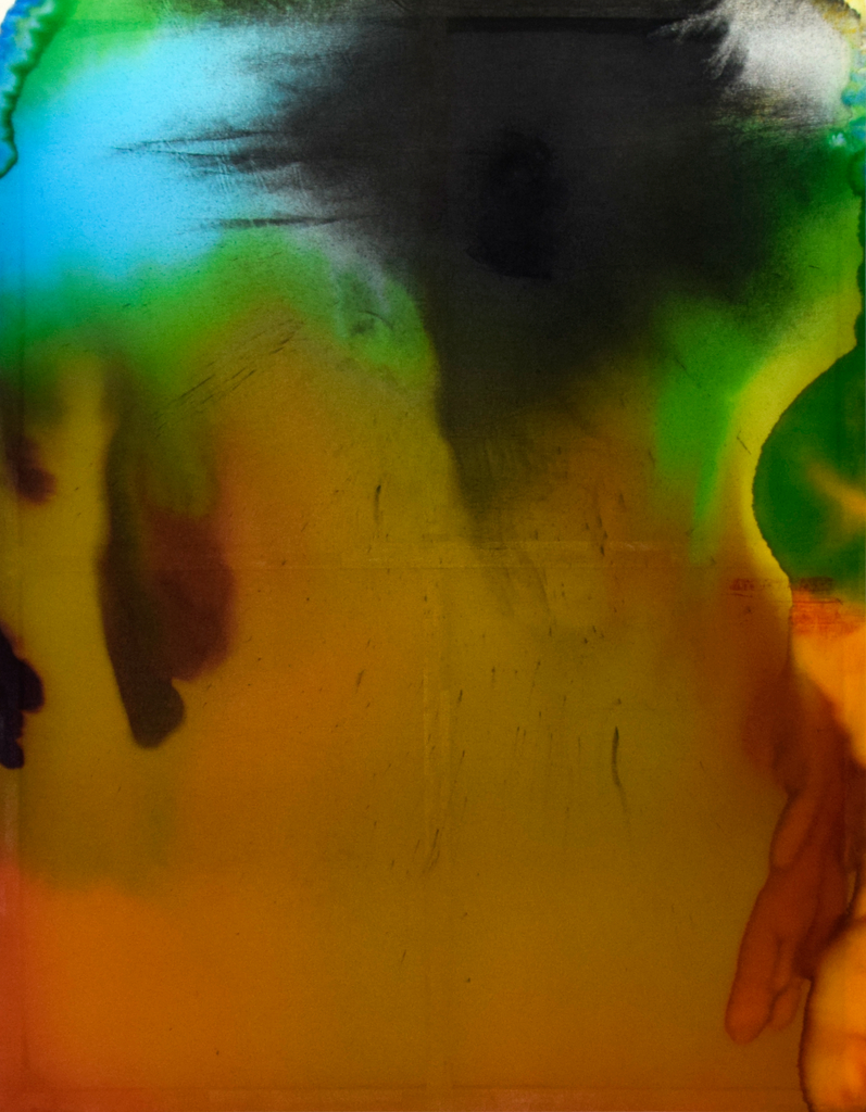 Sixtinische Madonna nach Raffael, 2017 Pigment Tusche auf Nessel 256 x 196cm